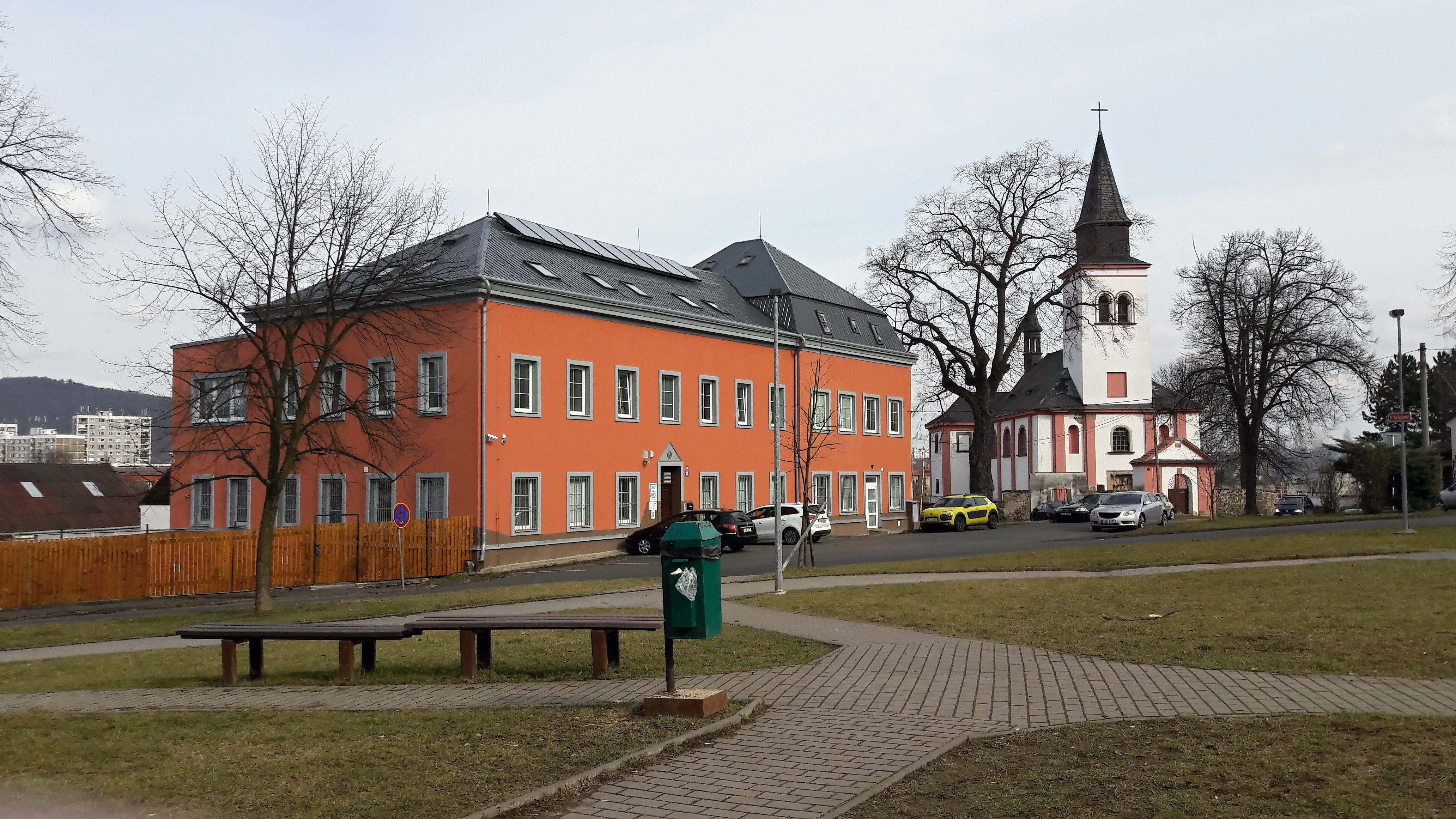 Náves Všebořic